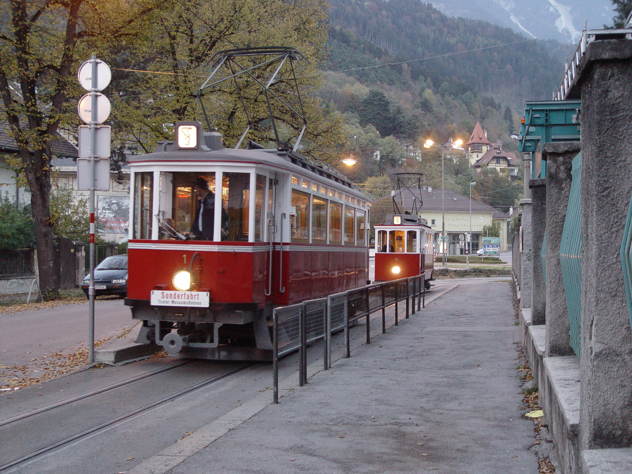 Triebwagen 1 und Triebwagen 19 der Tiroler Museumsbahnen bei der Endhaltestelle der Linie 1. So könnte es um 1970 ausgesehn haben.